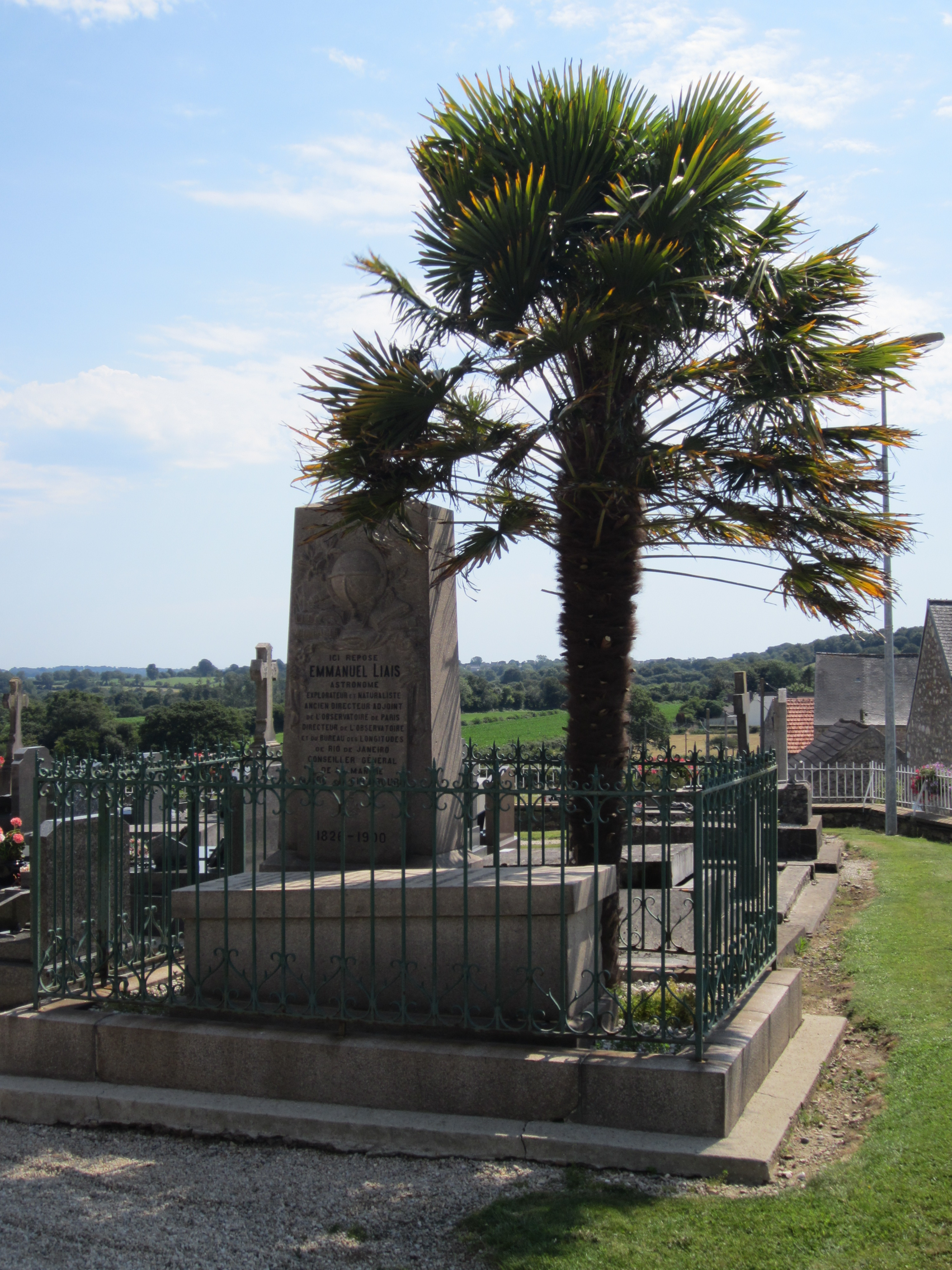 église Saint-Barthélemy d'Hardinvast, Manche